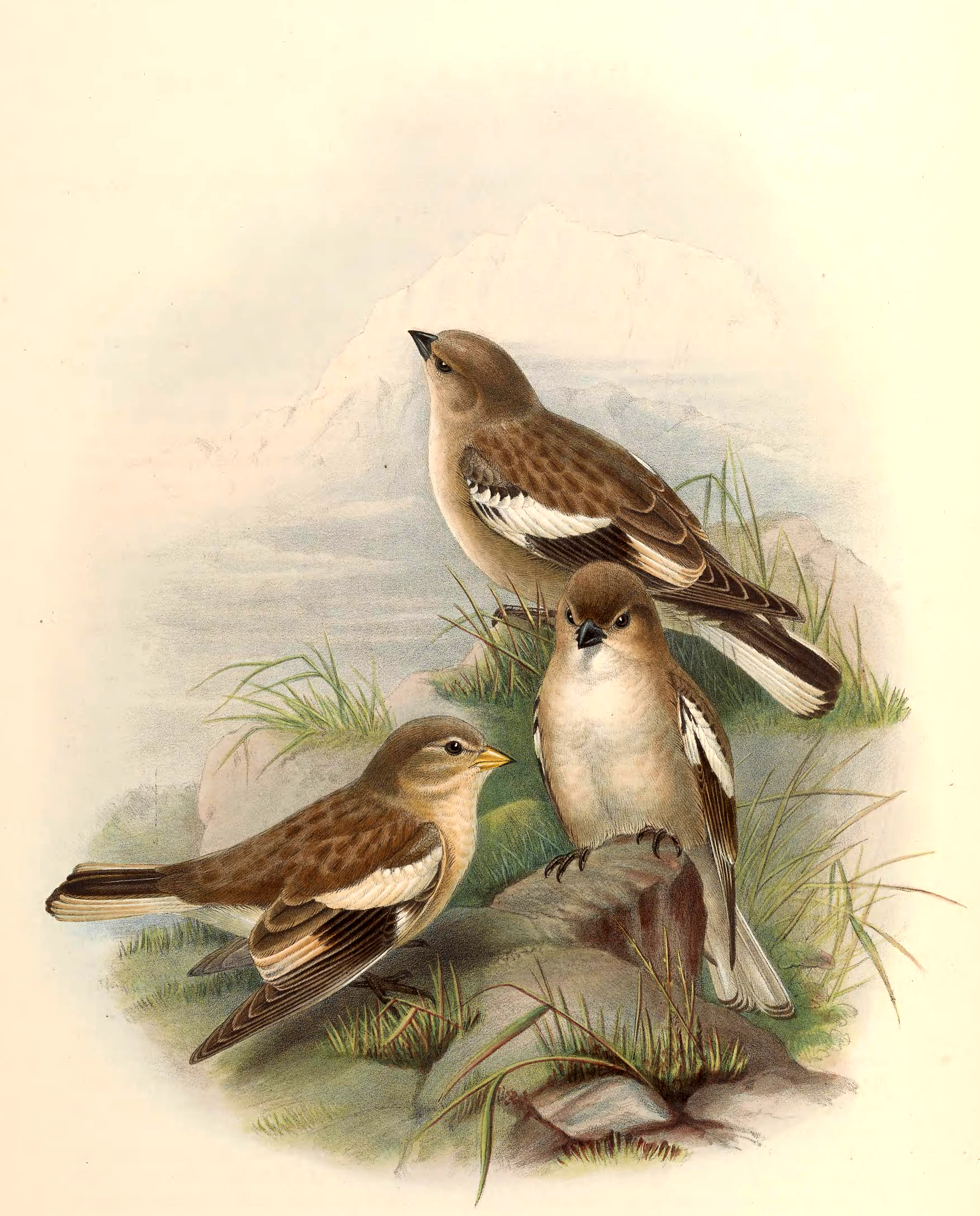 Montifringilla adamsi